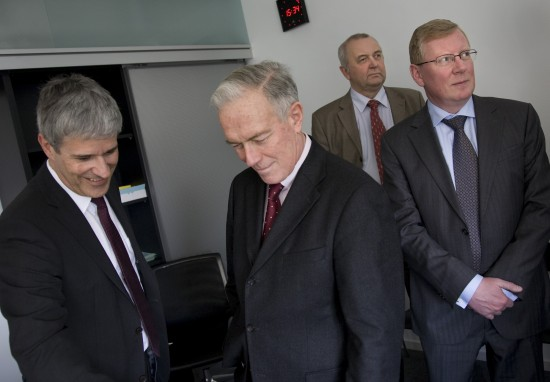 Start des swissinfo-Pilotversuches in russischer Sprache mit v.l.n.r.: swissinfo-Direktor Peter Schibli, Botschafter Anton Thalmann (Stv. Politischer Direktor im EDA), Botschaftssekretär Alexander Gladkov und Botschafter Igor Bratchikov.